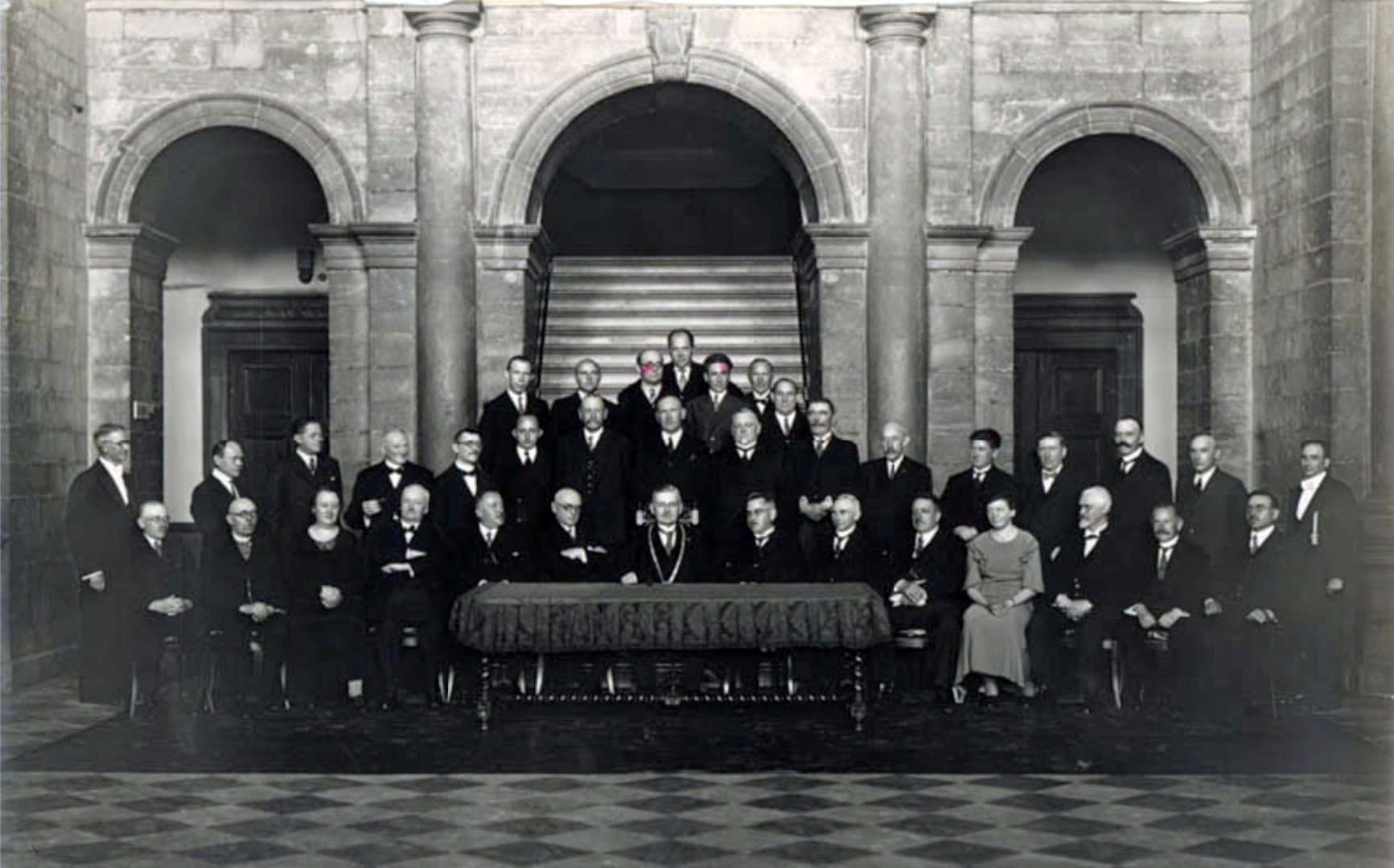 De gemeenteraad van Maastricht en personeelsleden in de hal ("Plein") van het Stadhuis bij gelegenheid van het zilveren ambtsjubileum van burgemeester Leopold van Oppen in 1935. Zittend v.l.n.r.: J. Paulissen, J.P.H. Duijsens, mw. A.C. Wijnandts-Louis, A.J.H. Hagdorn, E.A. Seussen, J.M.I. Schaepkens van Riempst, L.B.J. van Oppen (burgemeester), P.J.M. Kallen, J.M.H. Schoonbrood, L.L. Bollen, mej. W.P.J.M.H.L. Dopler en M.H. Ubachs. Staand eerste rij: J. Cadier, J.H.J. Gregoire, C.H. Pieters, M. Michon, J.H.W. Dolmans, F.v.d. Velde, J.W. Olij, G.H. Nijsten, A.L.Th.M. Stols, P.L.H. Ceulen, J.M. Linssen, G.H. Keulen, L.H.J. Lodewick, A.E. Kersten, J.C. Sleebe en V.M. Roumans. Derde rij: A. Soeters, mr. P.M.J.L. Janssen, mr. J.Ch.H.A. Vrijens, A.J.N. Boosten, L. Loontjens, L.H. Wijnands en Ph.H. Veenhof. Fotocollectie RHCL Maastricht, GAM 23791.